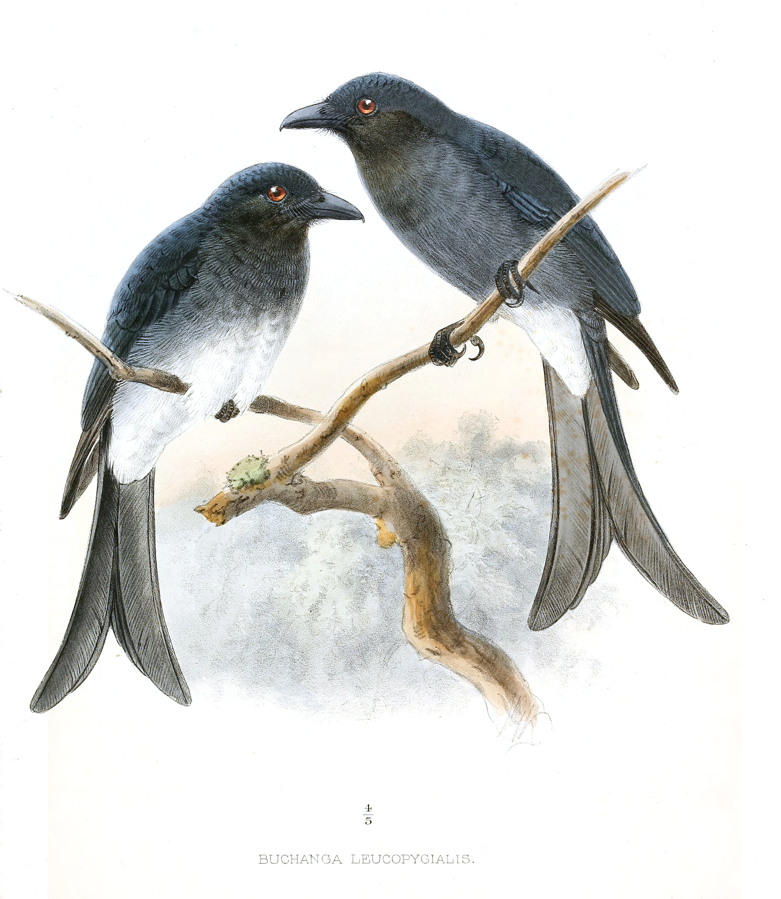 Dicrurus caerulescens leucopygialis